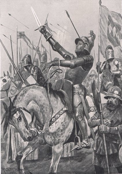 "מותו של הארי הוטספור"